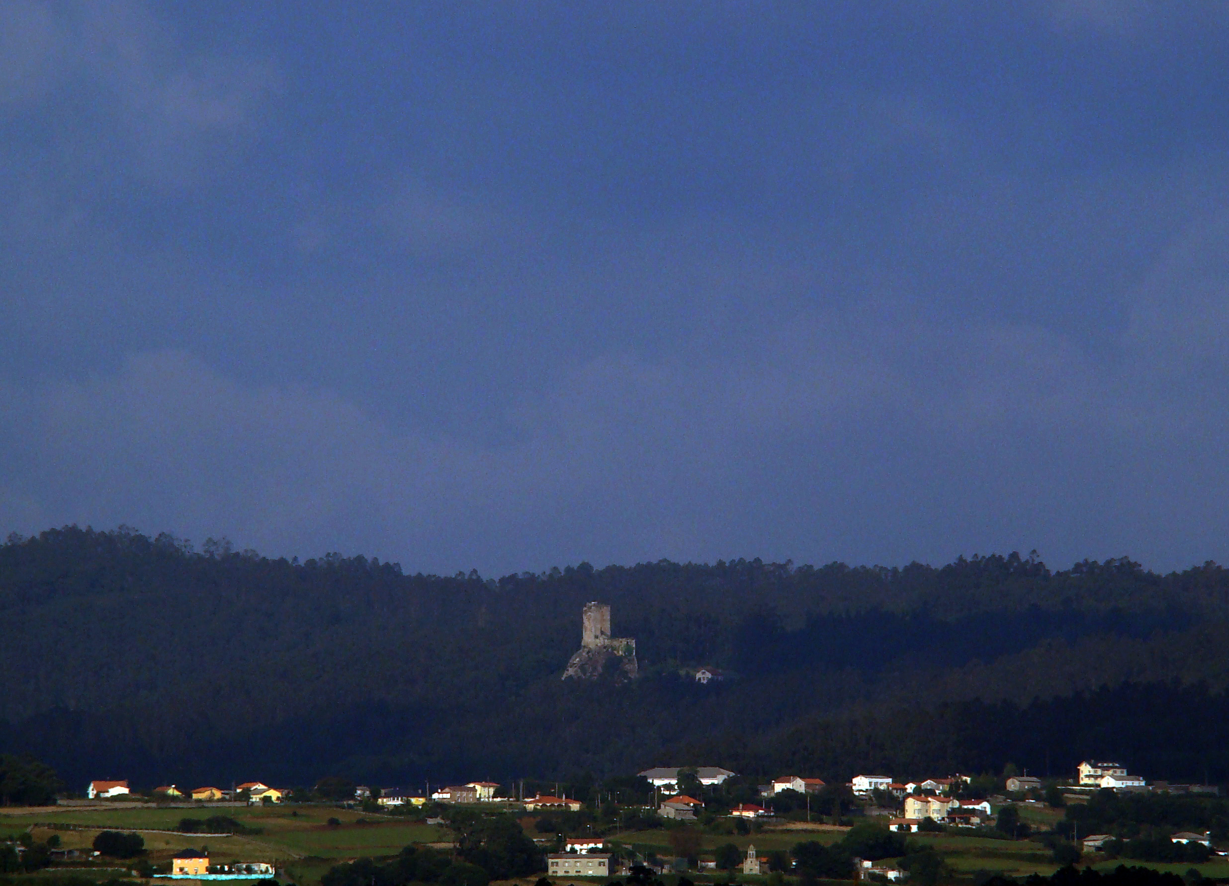 El Castillo de Andrade está a algo más de 10 Km. de Sada, en línea recta.